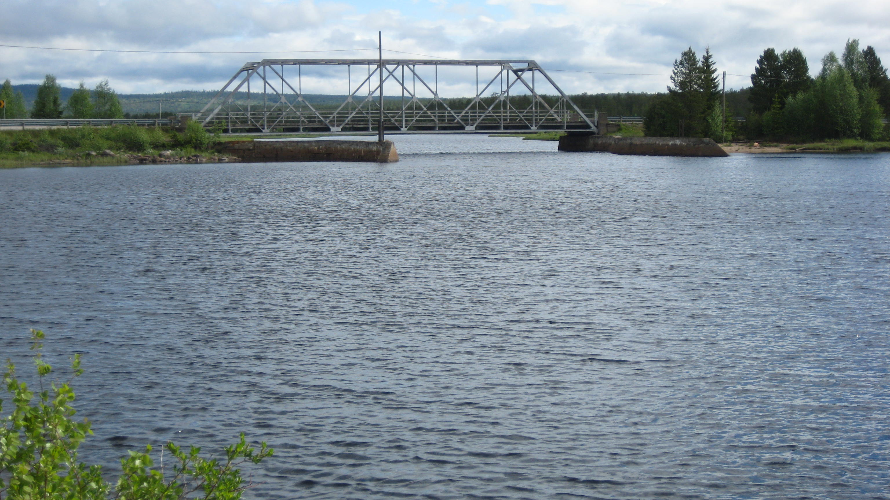 Brua over Slemma ved innløpet i Osensjøen